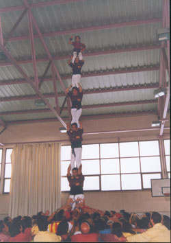 Primer pd6 carregat pels Xics de Granollers (Llinars del Vallès, 11/09/1998)